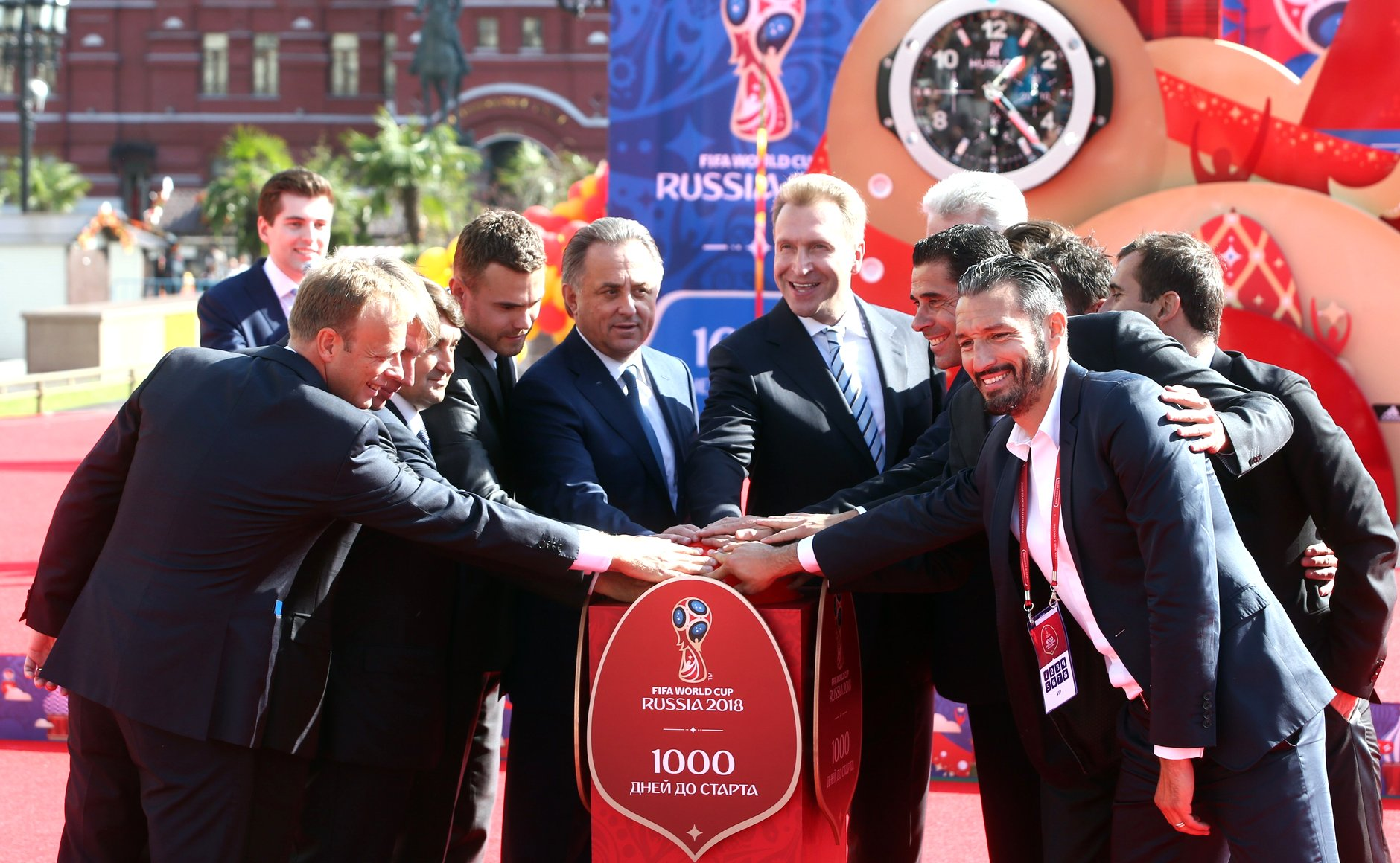 Церемония запуска обратного отсчёта 1000 дней до чемпионата мира по футболу FIFA 2018 в России